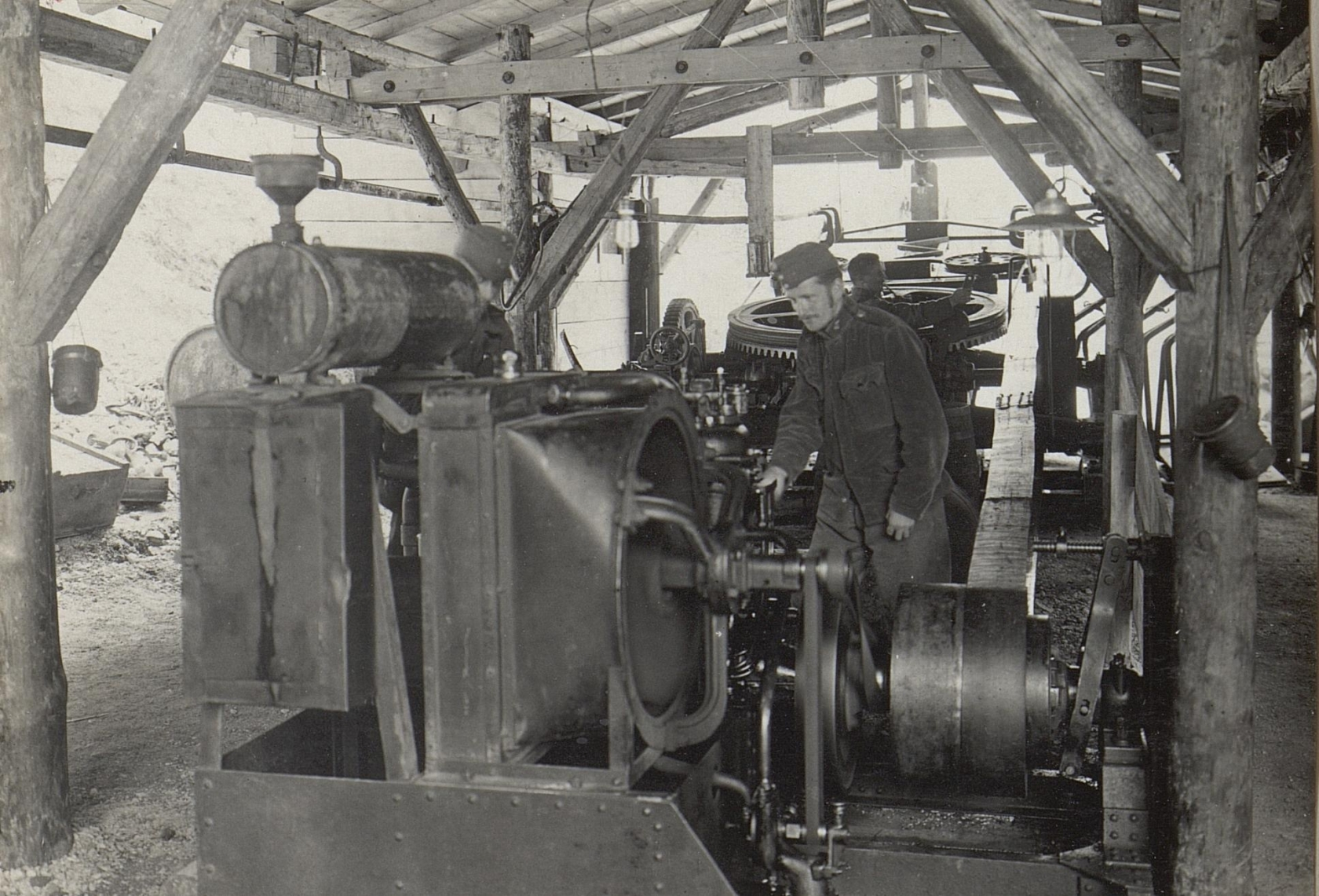 Schievenin, Antreibstation (Seilbahn).